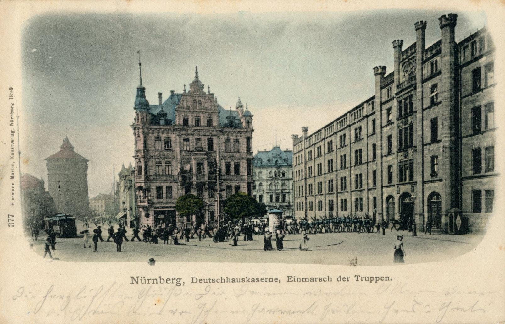 Ansichtskarte - Photo - coloriert - Nürnberg - Jakobsplatz - Deutschhauskaserne